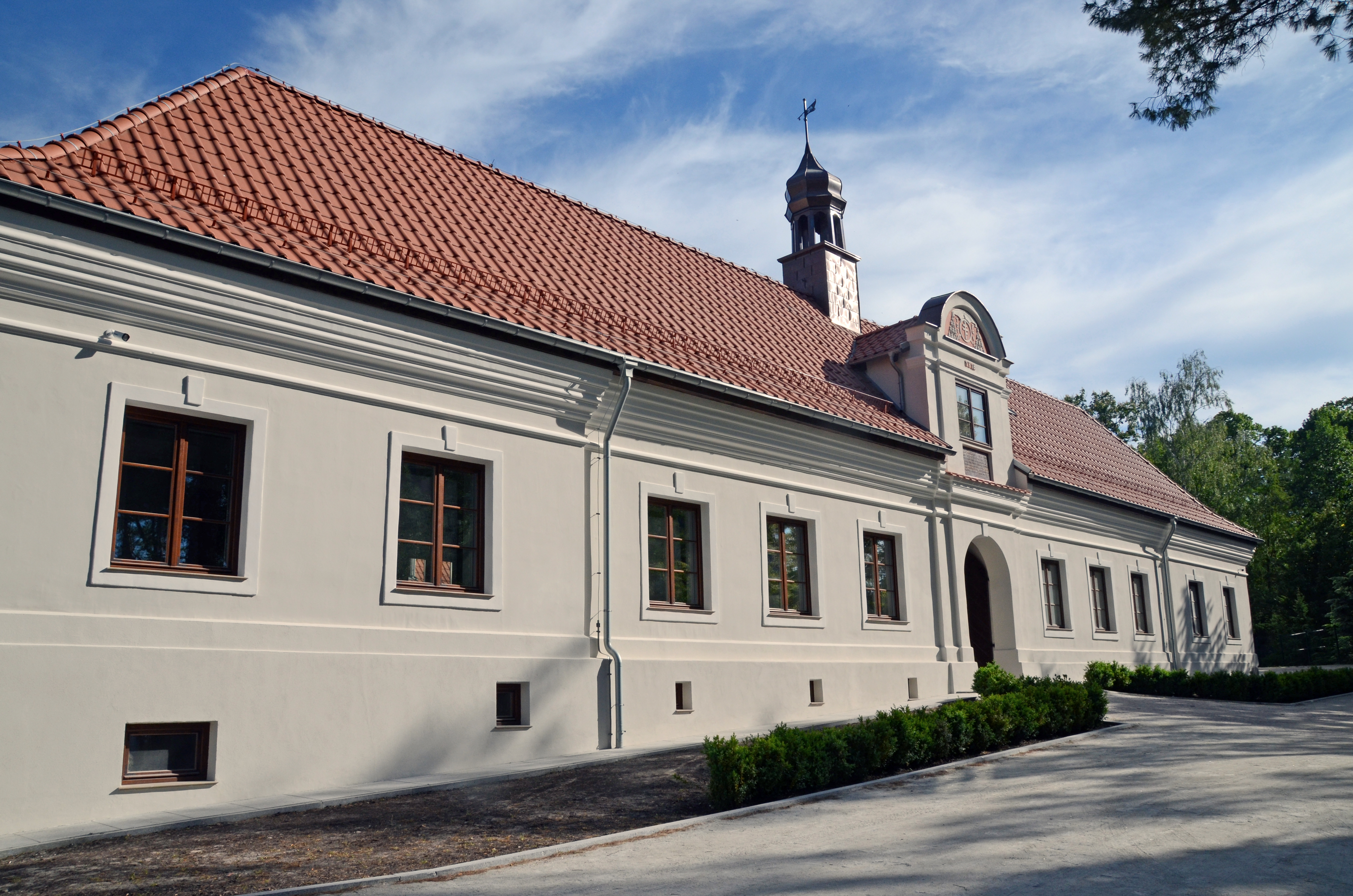 Dom konwertytów w Braniewie znajdujący się na ulicy Botanicznej 11. Zdjęcie przedstawia budynek po remoncie przeprowadzonym w latach 2014-2015. Zdjęcie jest własnością Fundacji Olimp.